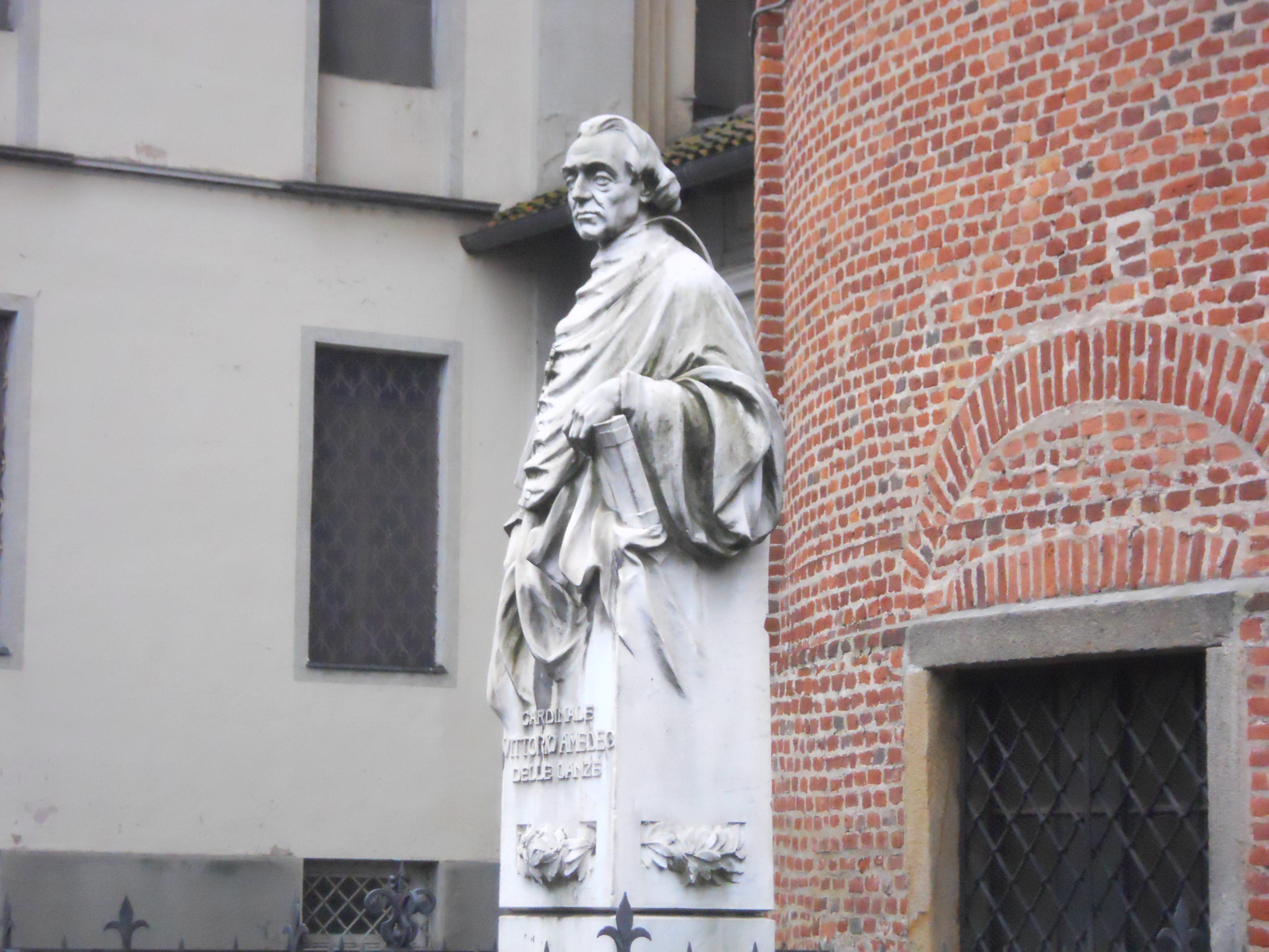 busto in onore del cardinale a San Benigno Canavese